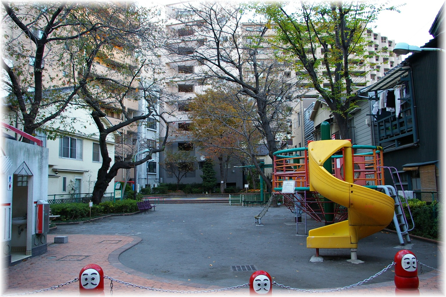 Ich machte dieses Foto von mir in 2006.